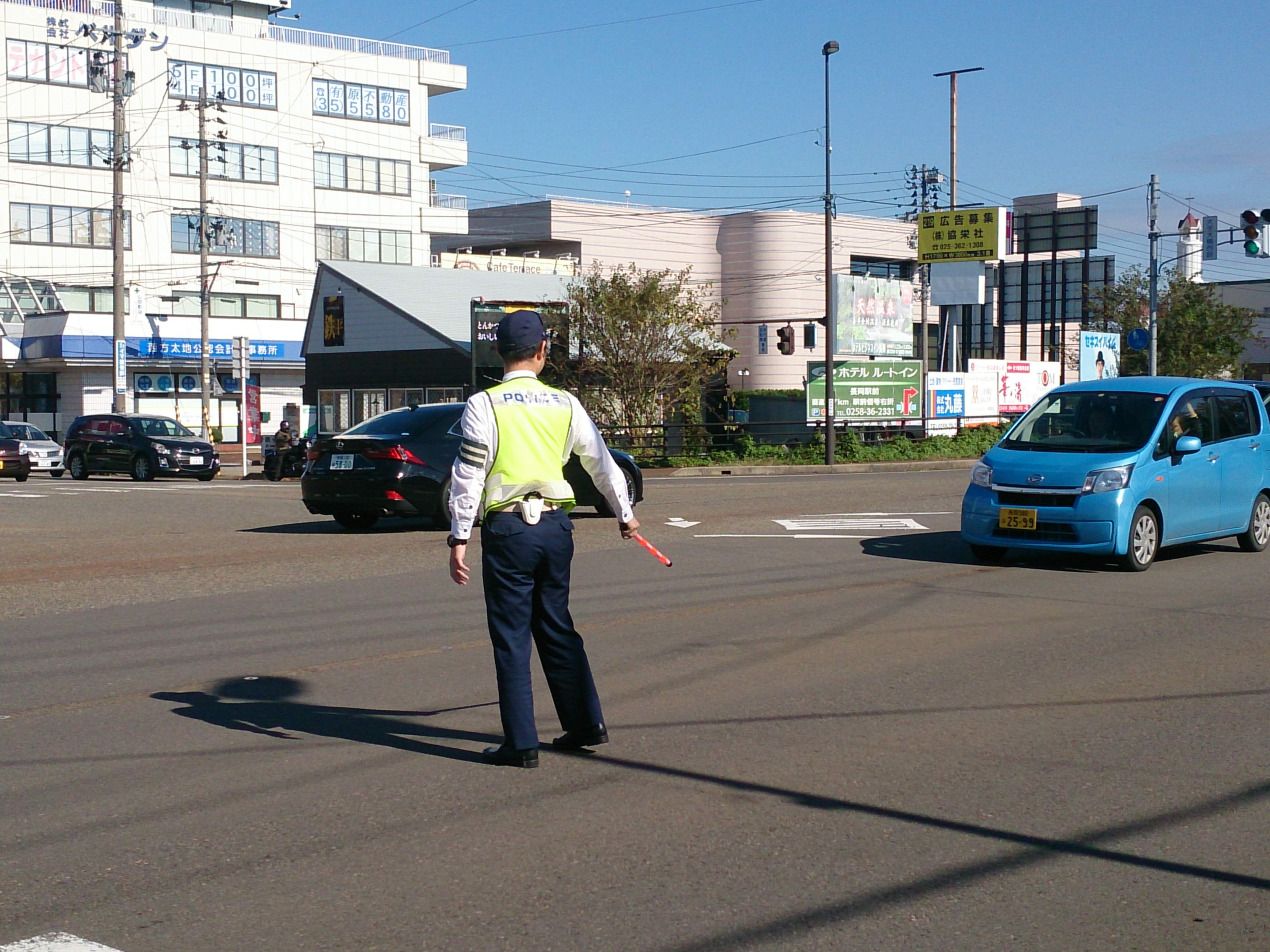 交差点で手信号を使い交通誘導中の新潟県警察官（機動隊）